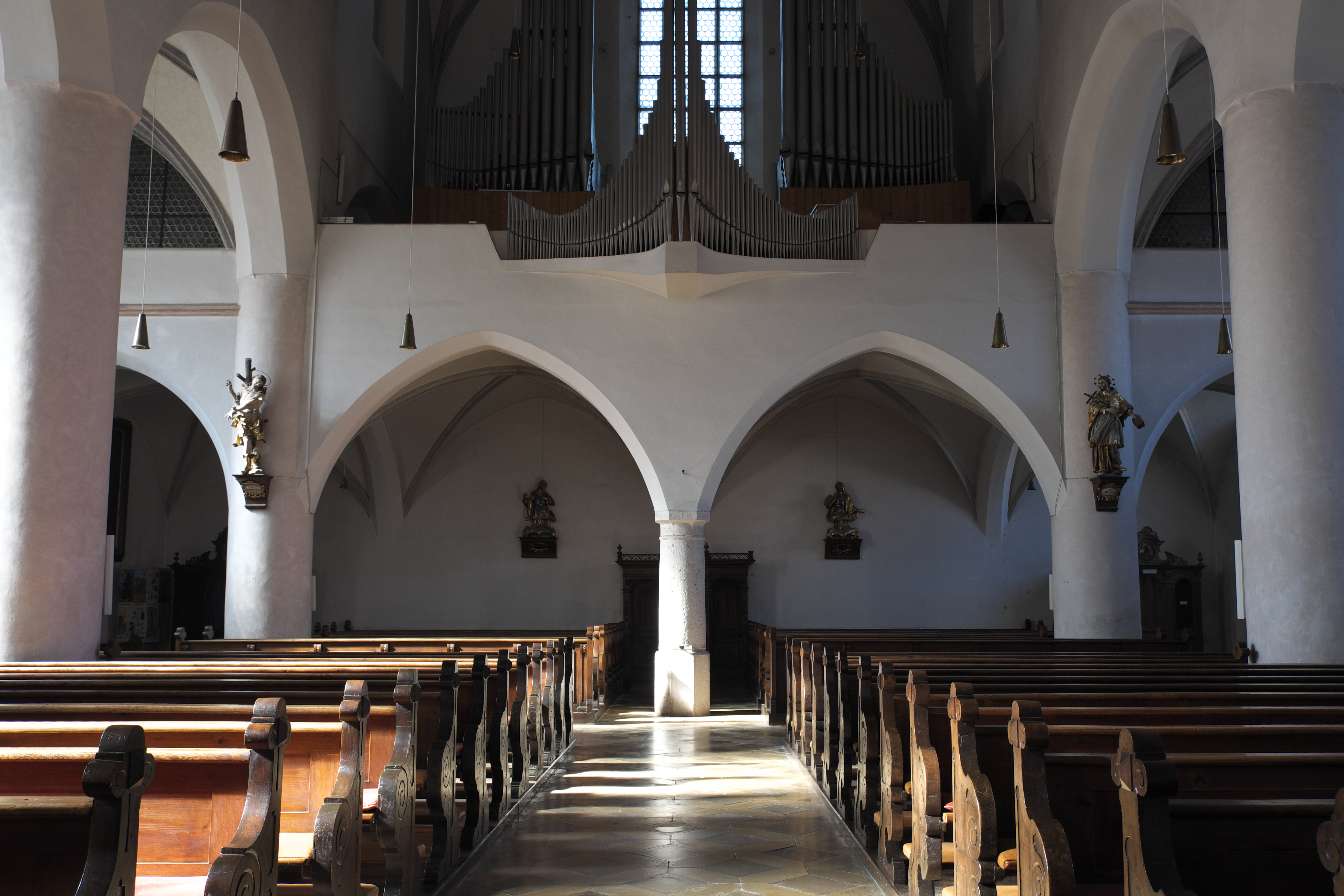 Katholische Stadtpfarrkirche Mariä Himmelfahrt in Höchstädt im Landkreis Dillingen an der Donau (Bayern), Blick zur Westempore